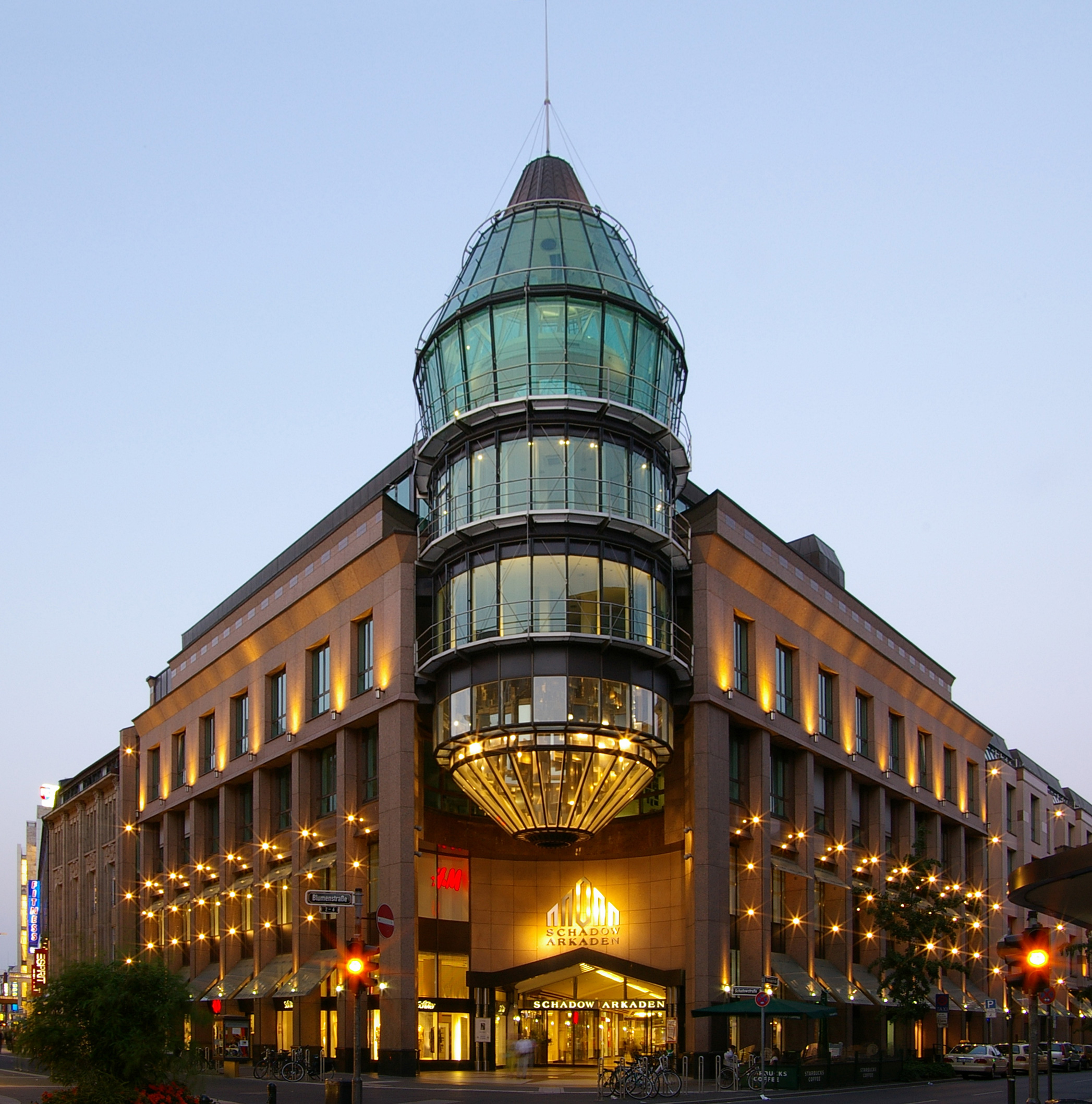 Eingang der Schadow Arkaden in Düsseldorf aus Blickrichtung von der Königsallee